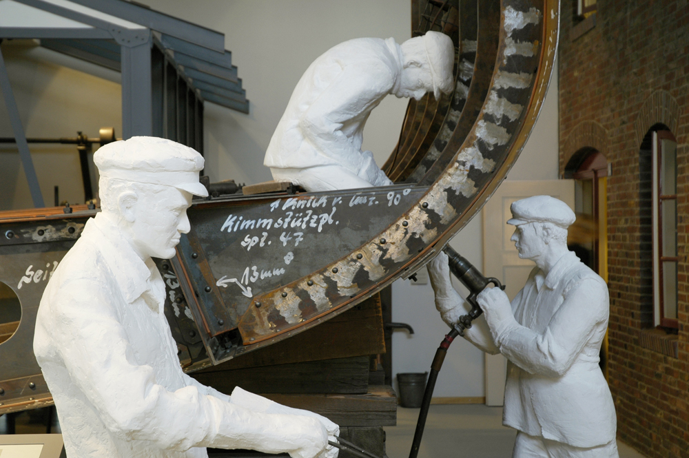 Nieterkolonne in der Schiffbauabteilung des Historischen Museums Bremerhaven.